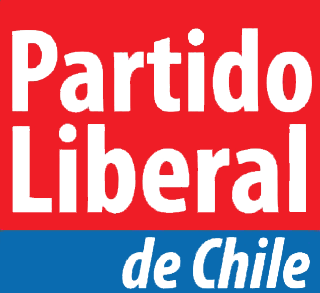 Emblema del Partido Liberal de Chile en 2013.